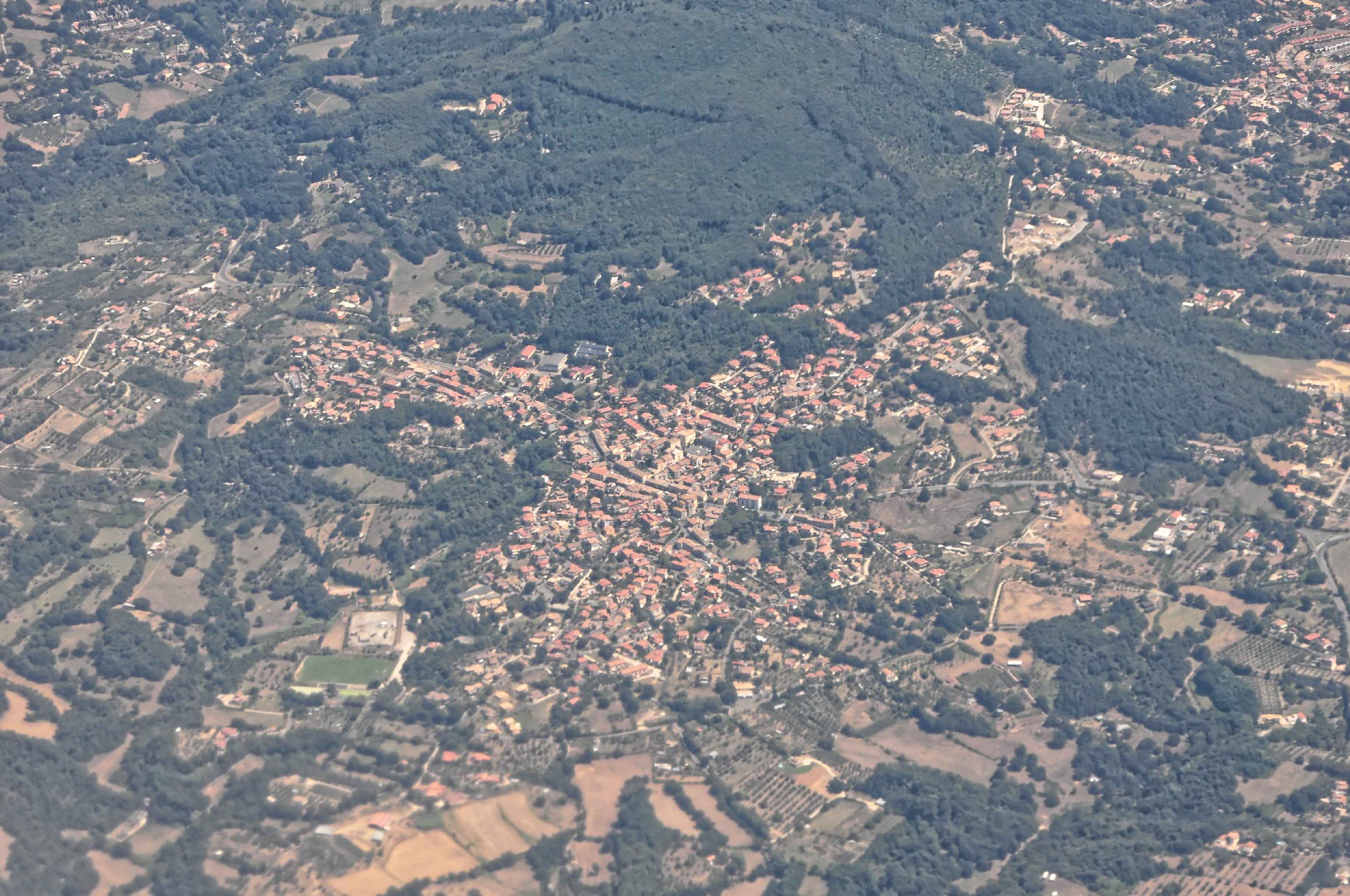 Bilder vom Flug -Rom-Düsseldorf-Hamburg 2013 Dieses Foto entstand in Zusammenarbeit mit Stadtbesichtigungen.de Die Seiten Stadtbesichtigungen.de, der dazugehörige Reise Blog sowie die Facebookseite: Stadtbesichtigungen Rom dürfen dieses Bild für Ihre Veröffentlichungen ohne den Hinweis auf Wikipedia, Commons bzw der Lizenz verwenden. Die Verantwortlichen habe von mir (Ra Boe) die Originaldaten zur freien Verfügung übermittelt bekommen.